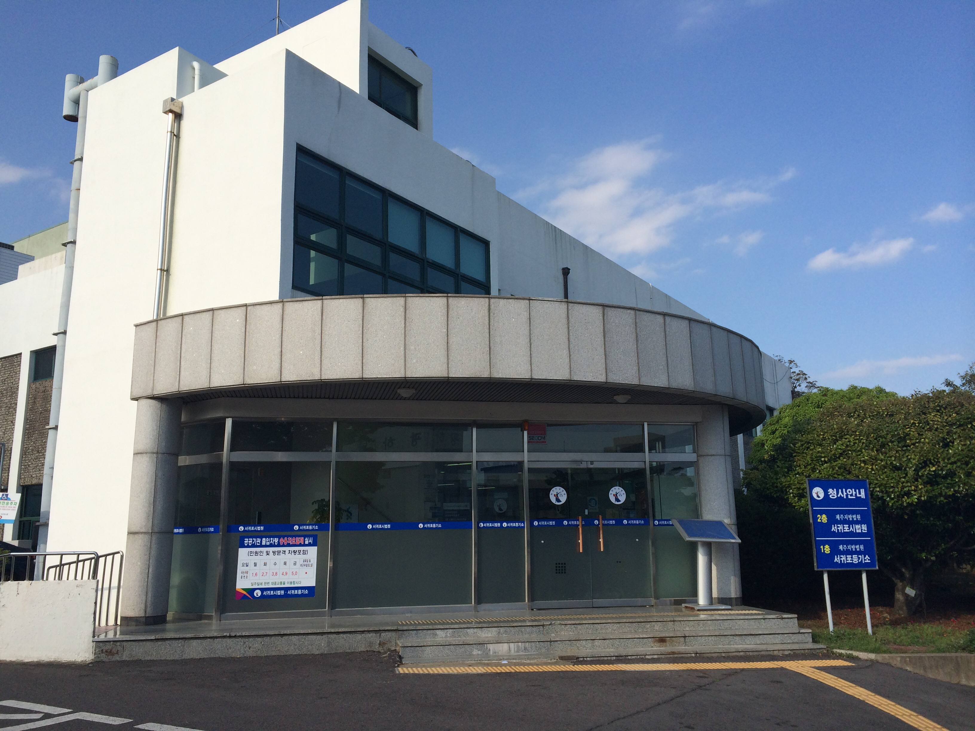 서귀포시 법원